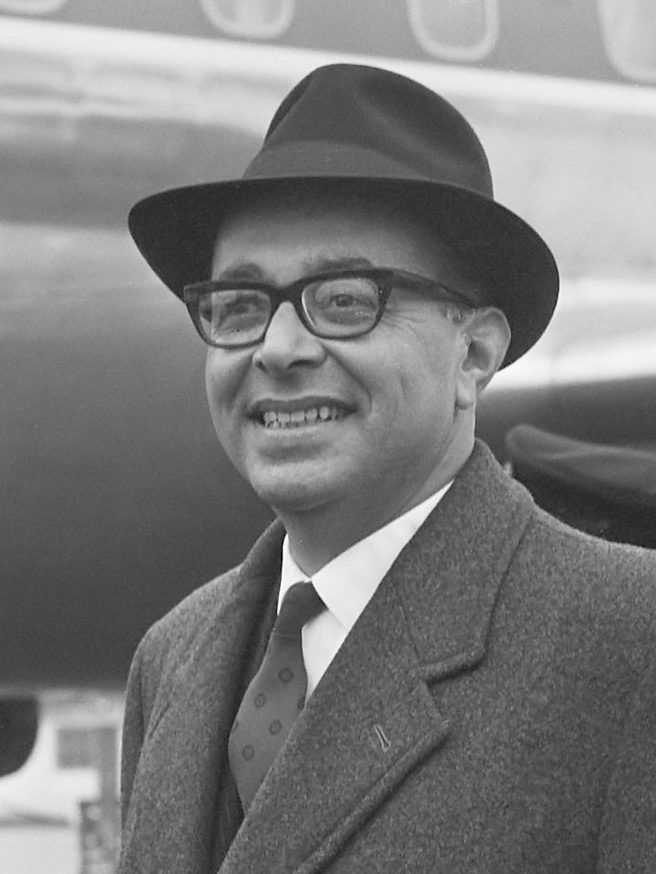 Aankomst Gouverneur de Vries en echtgenote van Suriname, Schiphol 4 april 1966